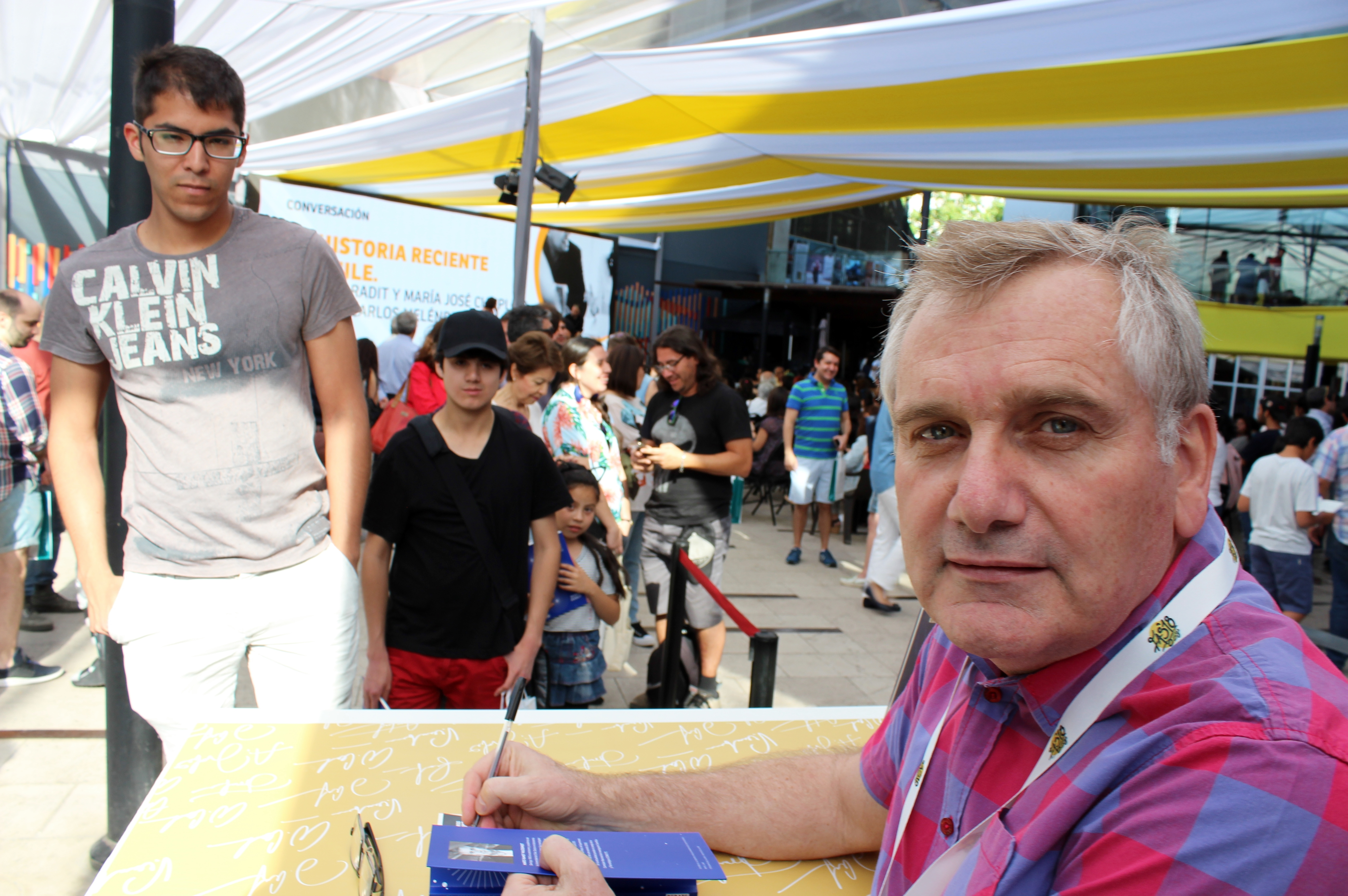 El astrónomo chileno Mario Hamuy durante una sesión de firma de libros en la segunda etapa del Festival de Autores de Santiago 2018 realizada en el GAM.